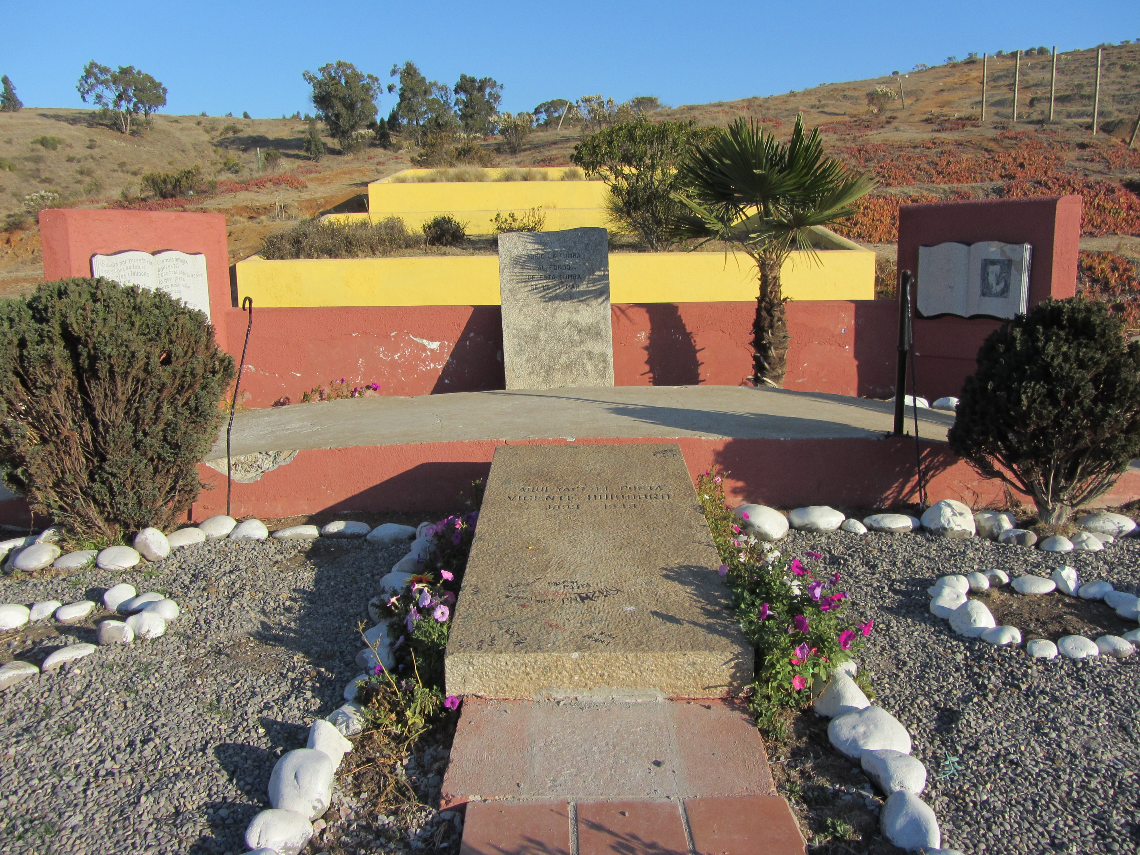 Cartagena